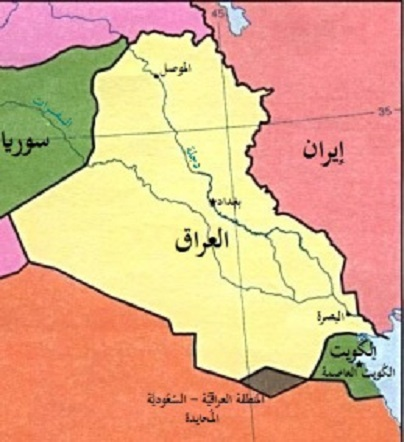 خريطة تُظهر المنطقة المُحيادة بين الجُمهوريَّة العراقيَّة والمملكة العربيَّة السُعُوديَّة، كما تظهر بها الكُويت وإيران وسوريا.